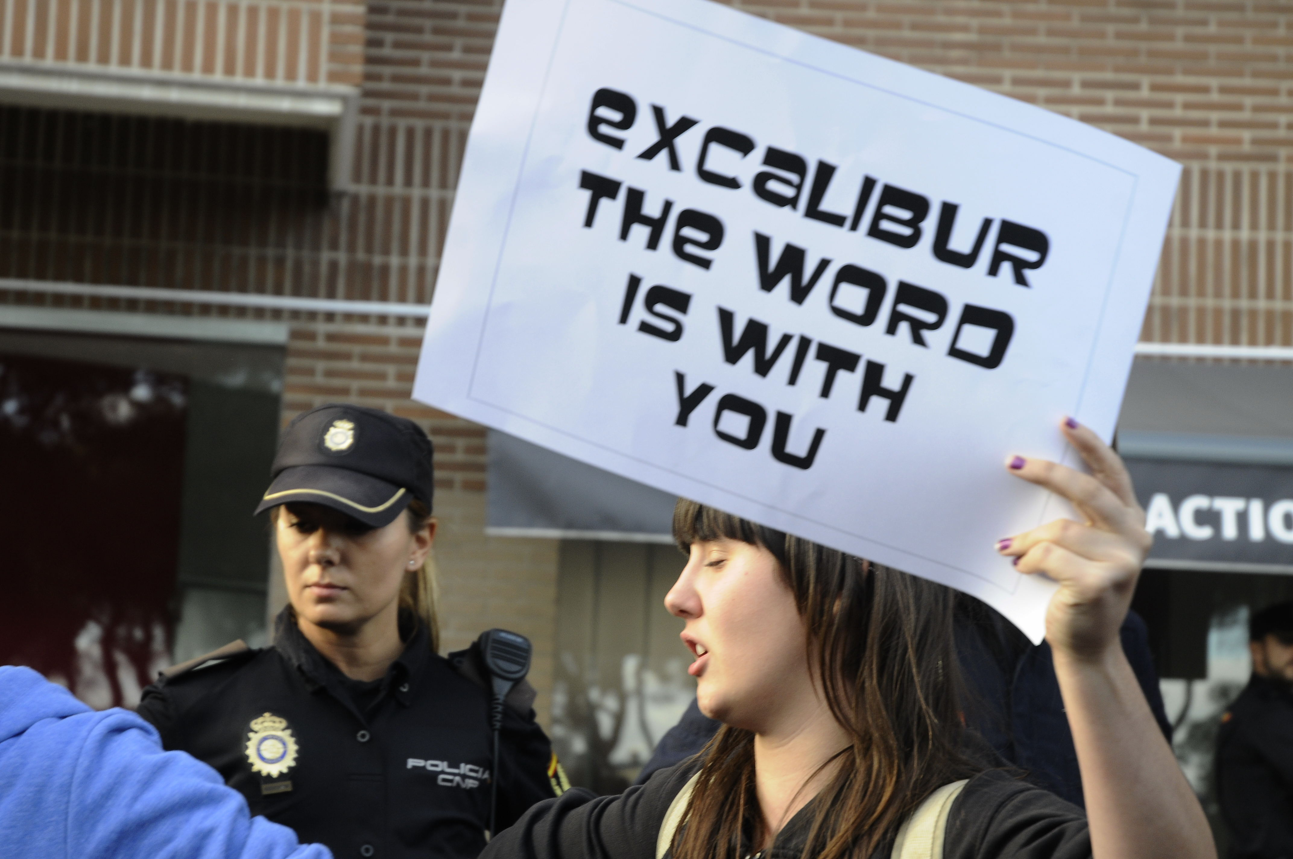 El 7 de sept. 2014 la Comunidad de Madrid decreto la ejecución de Excalibur, el perro de Javier y Teresa, infectados por el ébola. Sin realizarle ninguna prueba y ante los informes científicos que pedían que no se le sacrificase, las autoridades asesinaron a Excalibur. Numerosos activistas estuvimos 24 hrs de guardia tratando de evitar su muerte. Estas son imágenes de lo ocurrido.